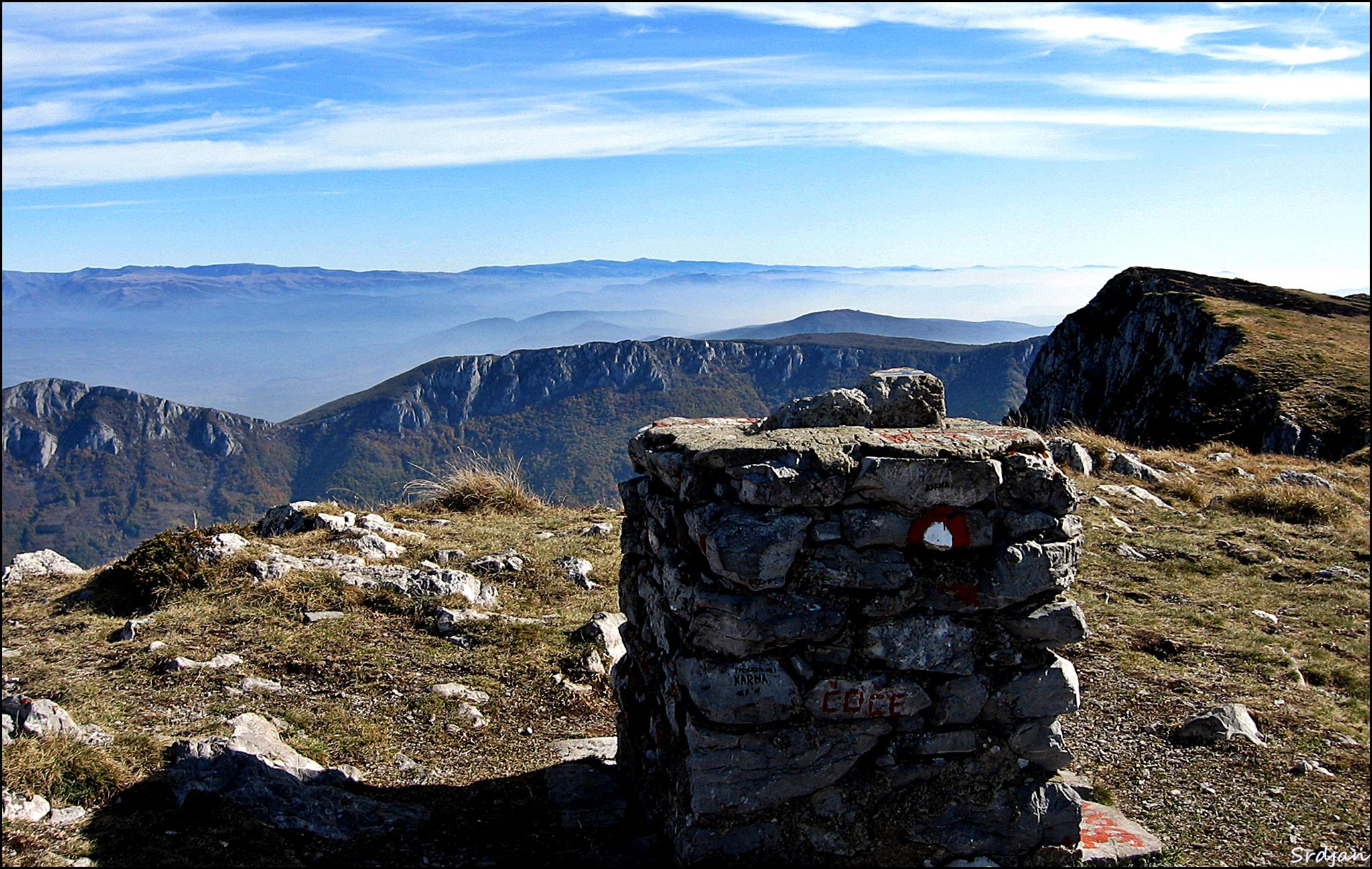 Srpski (latinica): Najviši vrh Suve planine, Trem,(sa piramidom od kamena koja označava kotu 1.810 m)